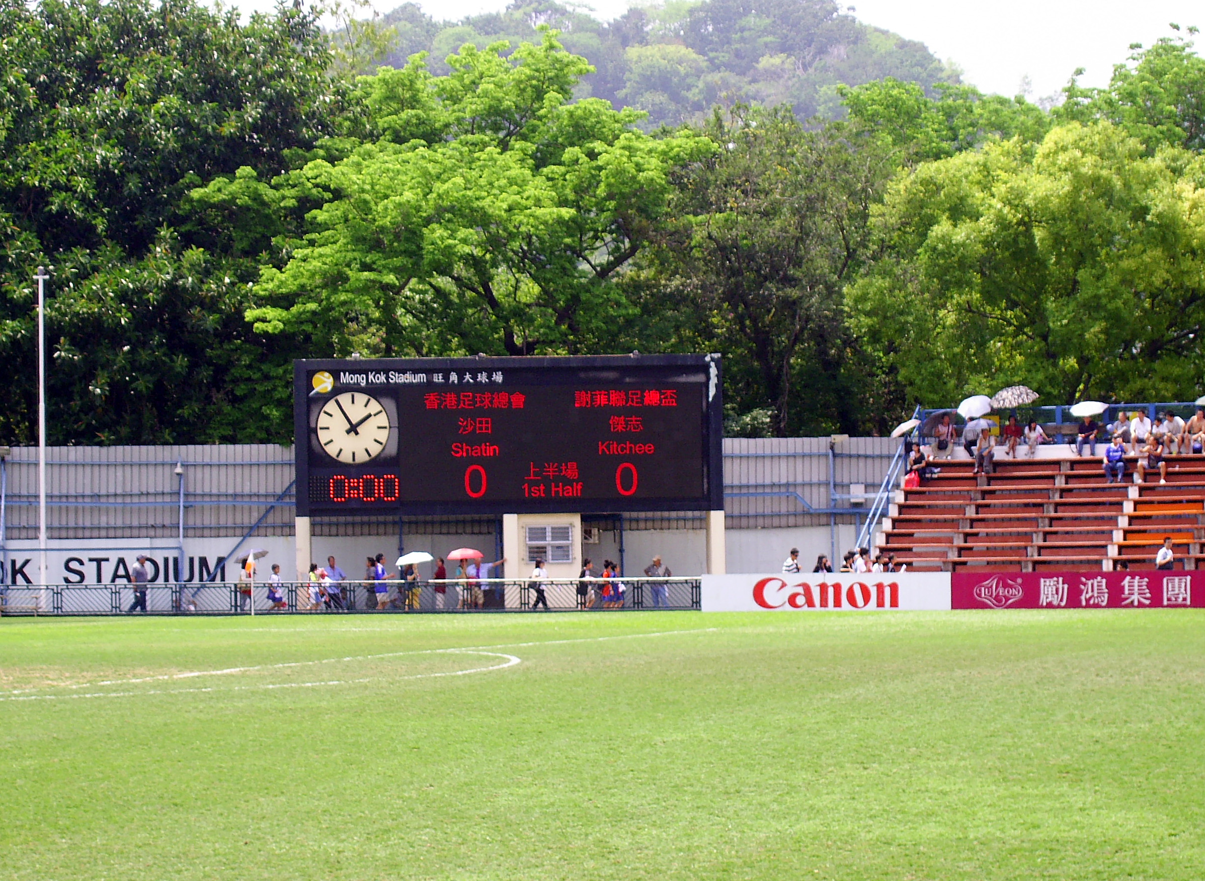 中文（香港）: 旺角大球場三色顯示電子計分屏幕